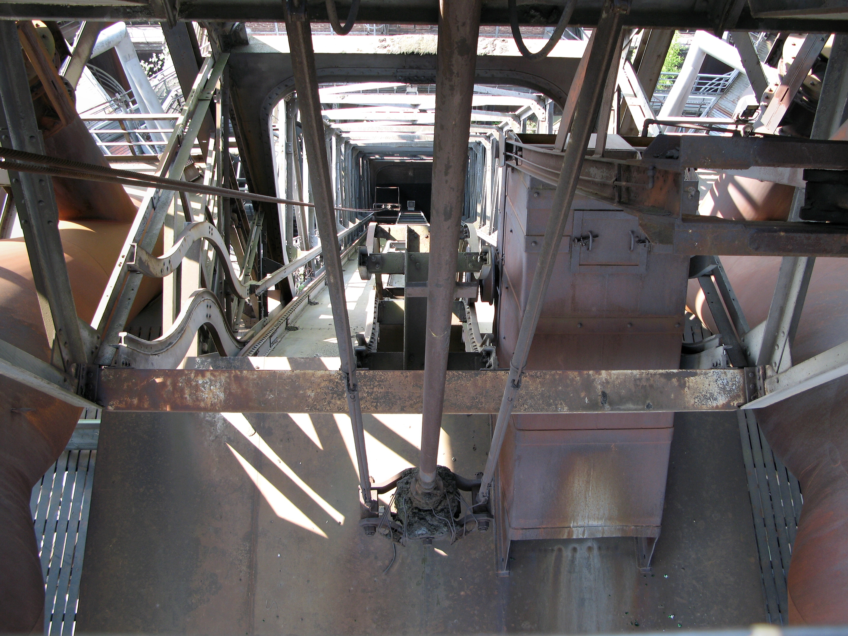 Landschaftspark Duisburg-Nord - Beschickungsloren (hängend und kippend) am Hochofen 5